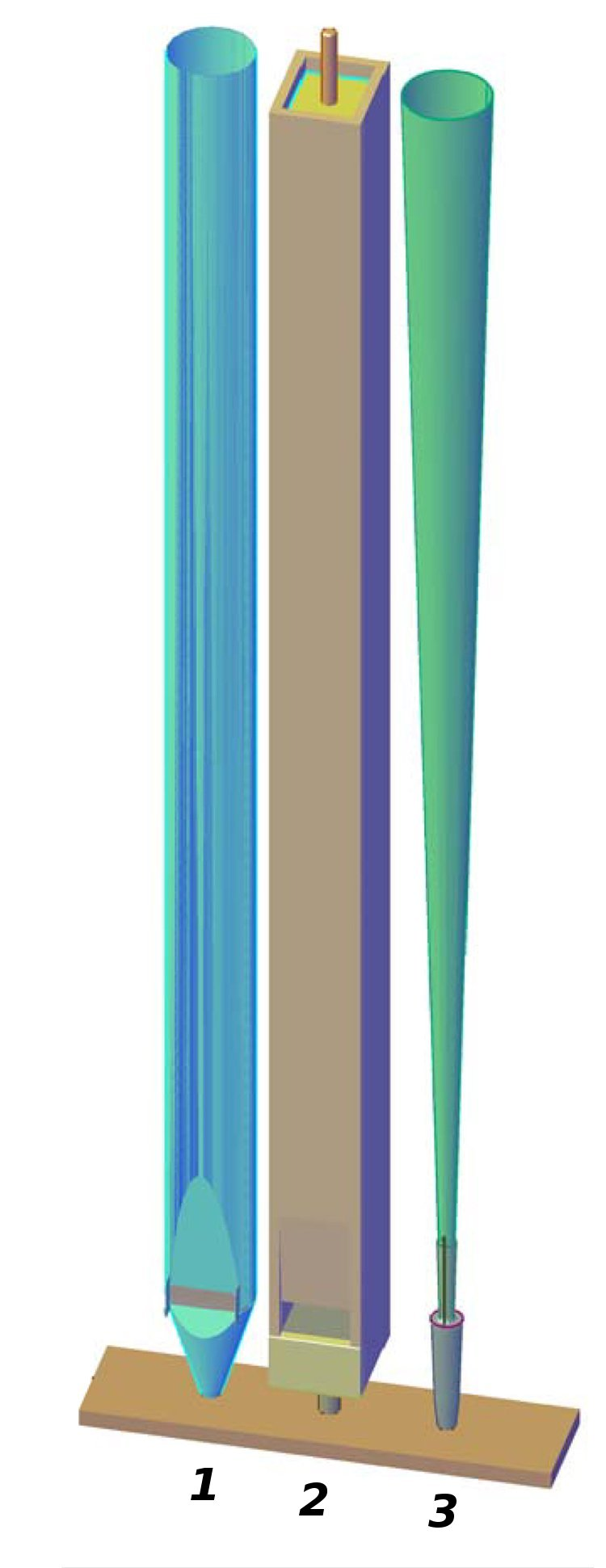 Orgelpfeifen (Schema der verschiedenen Bauformen)